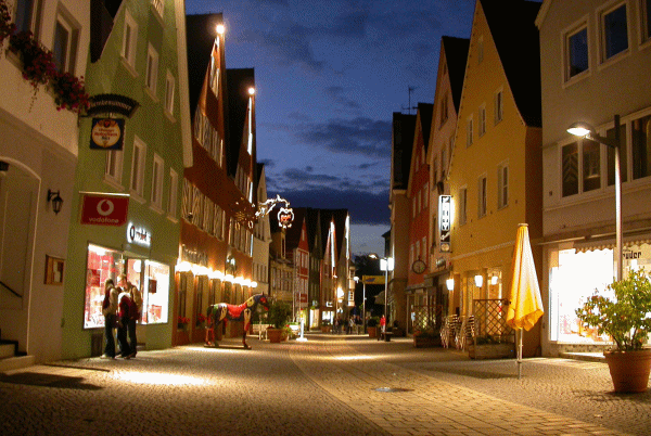 Blick auf die nächtliche Schmiedstraße